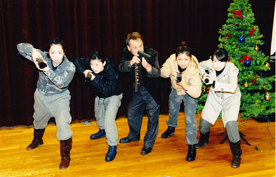 Festival 記念写真